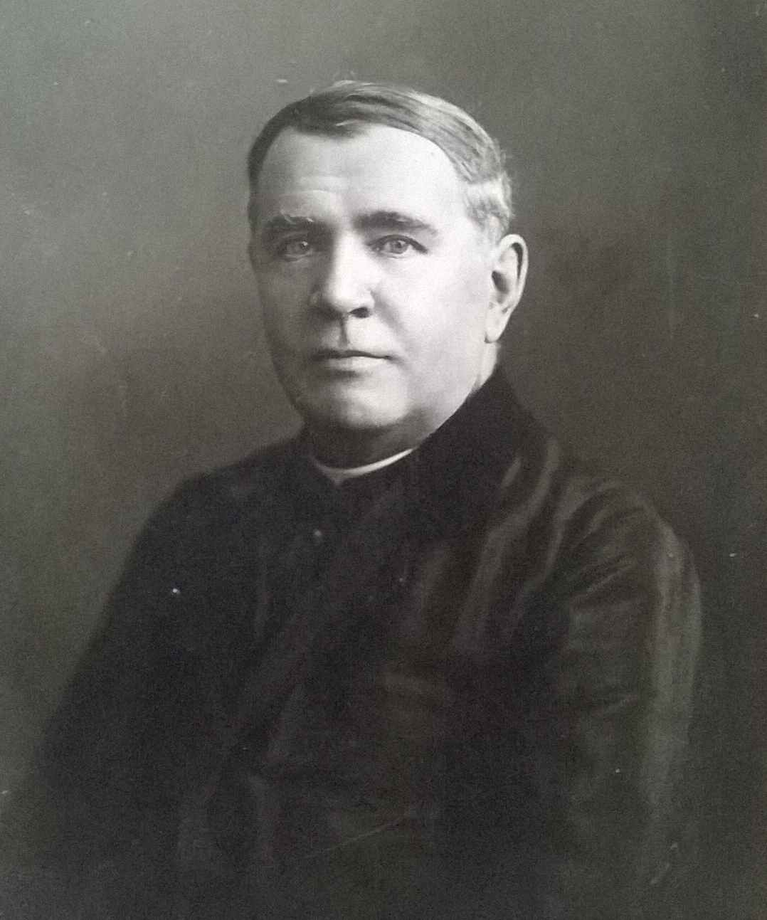 Retrato digitalizado del Pbro, Arq. Ernesto Vespignani